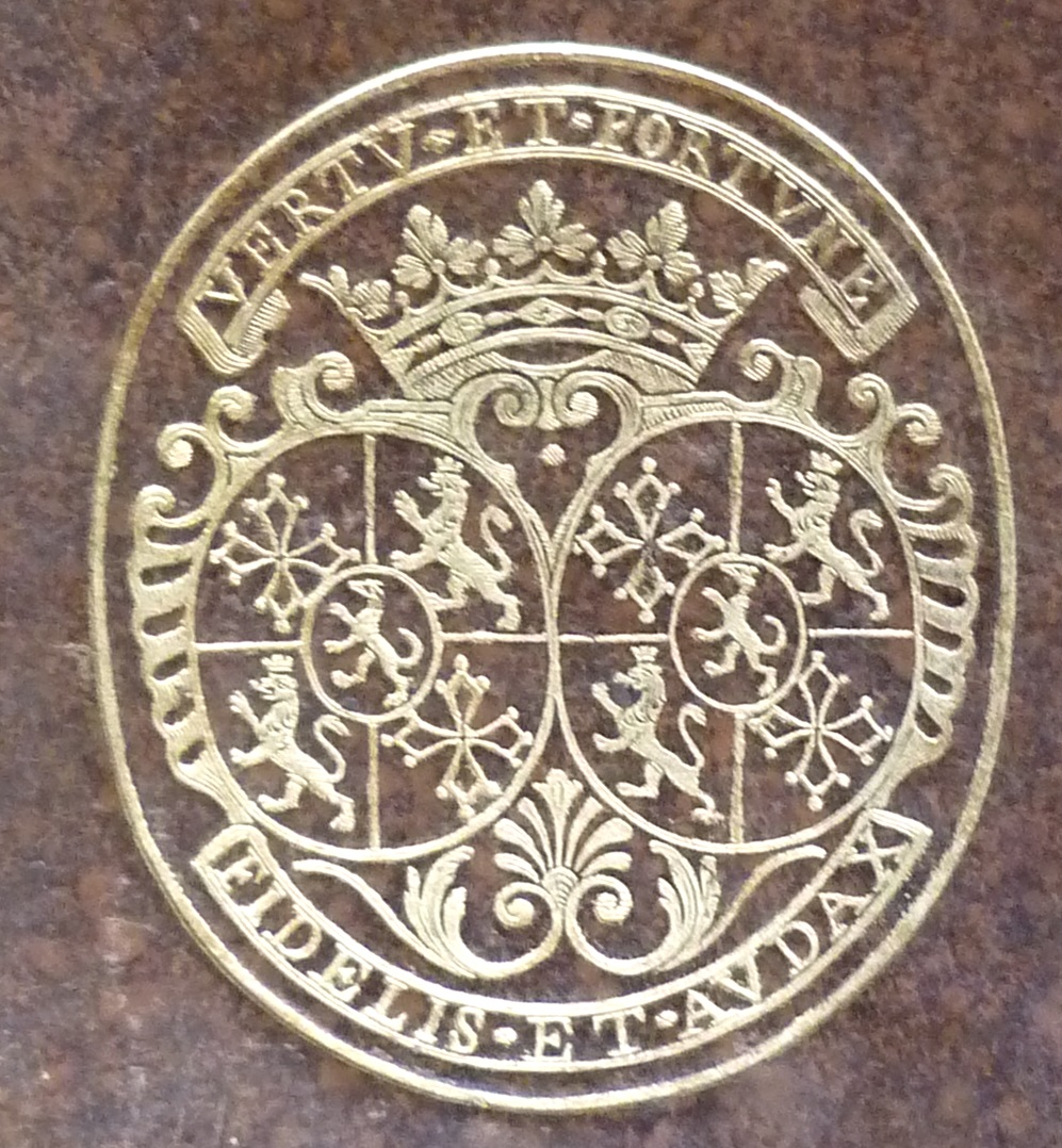 Livre aux armes de Marguerite-Delphine de Valbelle, dame de Tourves (ca 1705-1784) Ecu double de la famille de Valbelle (Écartelé: aux 1 et 4, de gueules, à la croix de Toulouse d'or; aux 2 et 3, de gueules, au lion d'or, armé, lampassé et couronné du même. Sur le tout d'azur, au lévrier d'argent, colleté de gueules). Devises «Vertu et Fortune - Fidelis et Avdax»